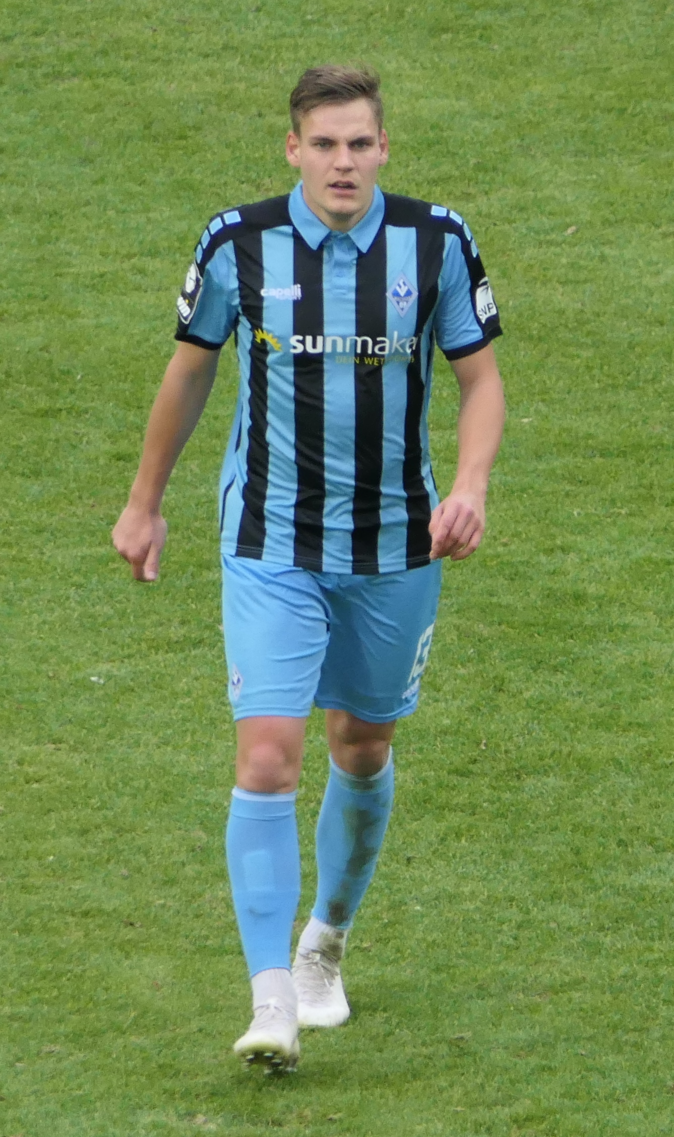 Der Fussballprofi Max Christiansen im Trikot vom SV Waldhof Mannheim beim Heimspiel gegen Eintracht Braunschweig am 08.12.2019.